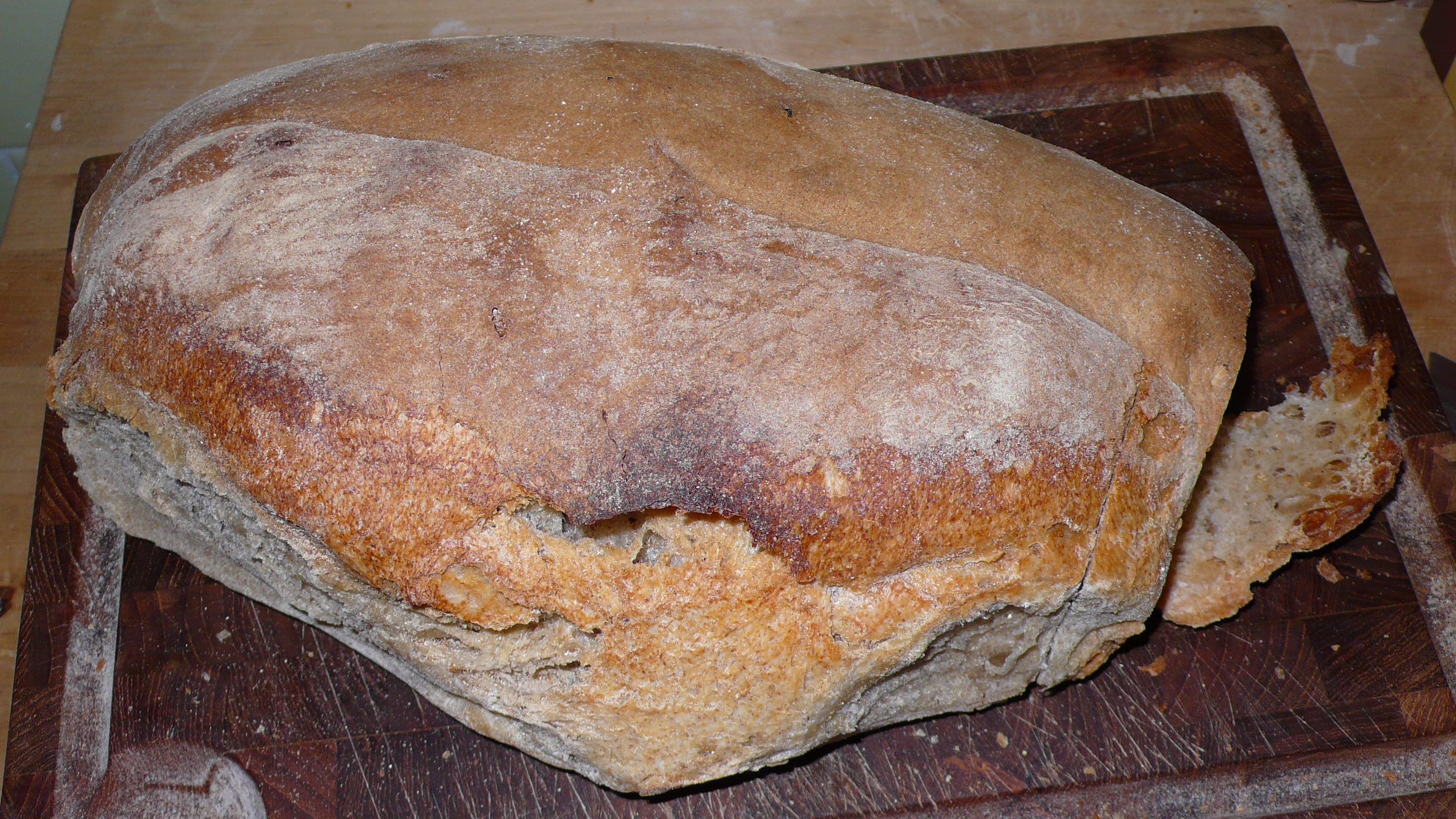 Foto di una pagnotta di Lariano